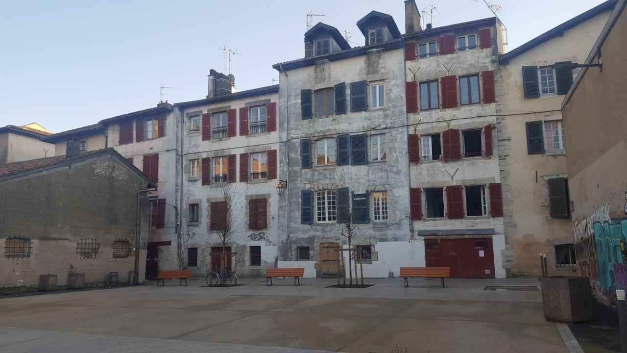 Baionako Patxa plaza, Baiona Ttipian